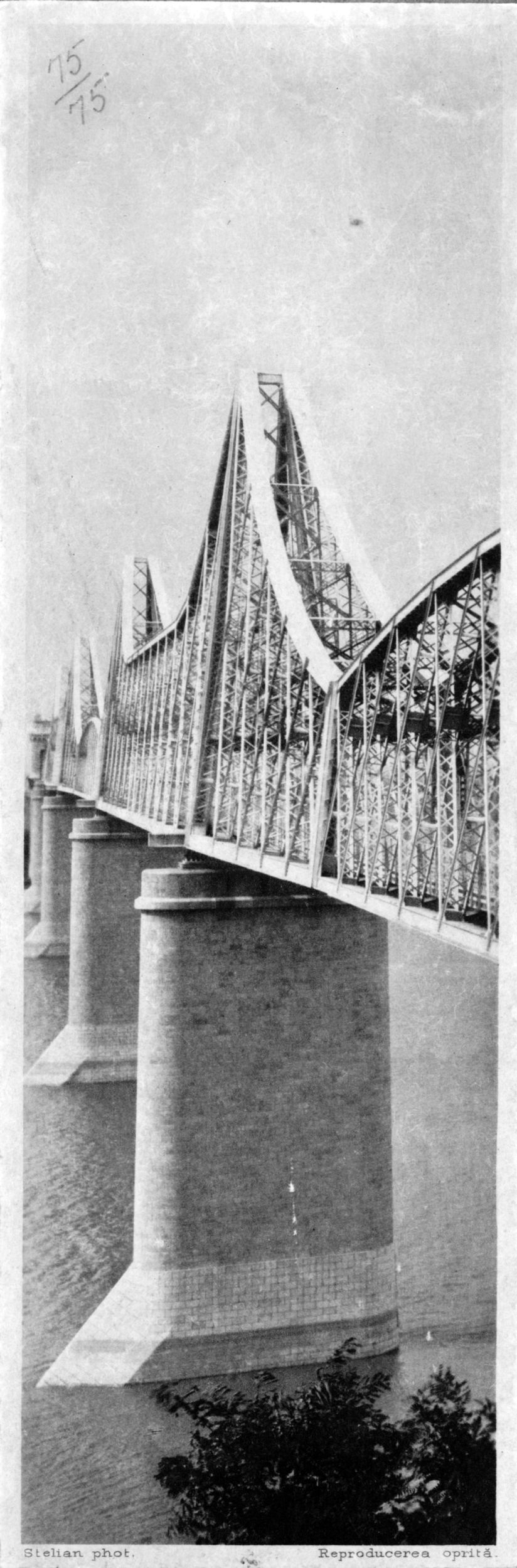 Carol I bridge at Cernavodă